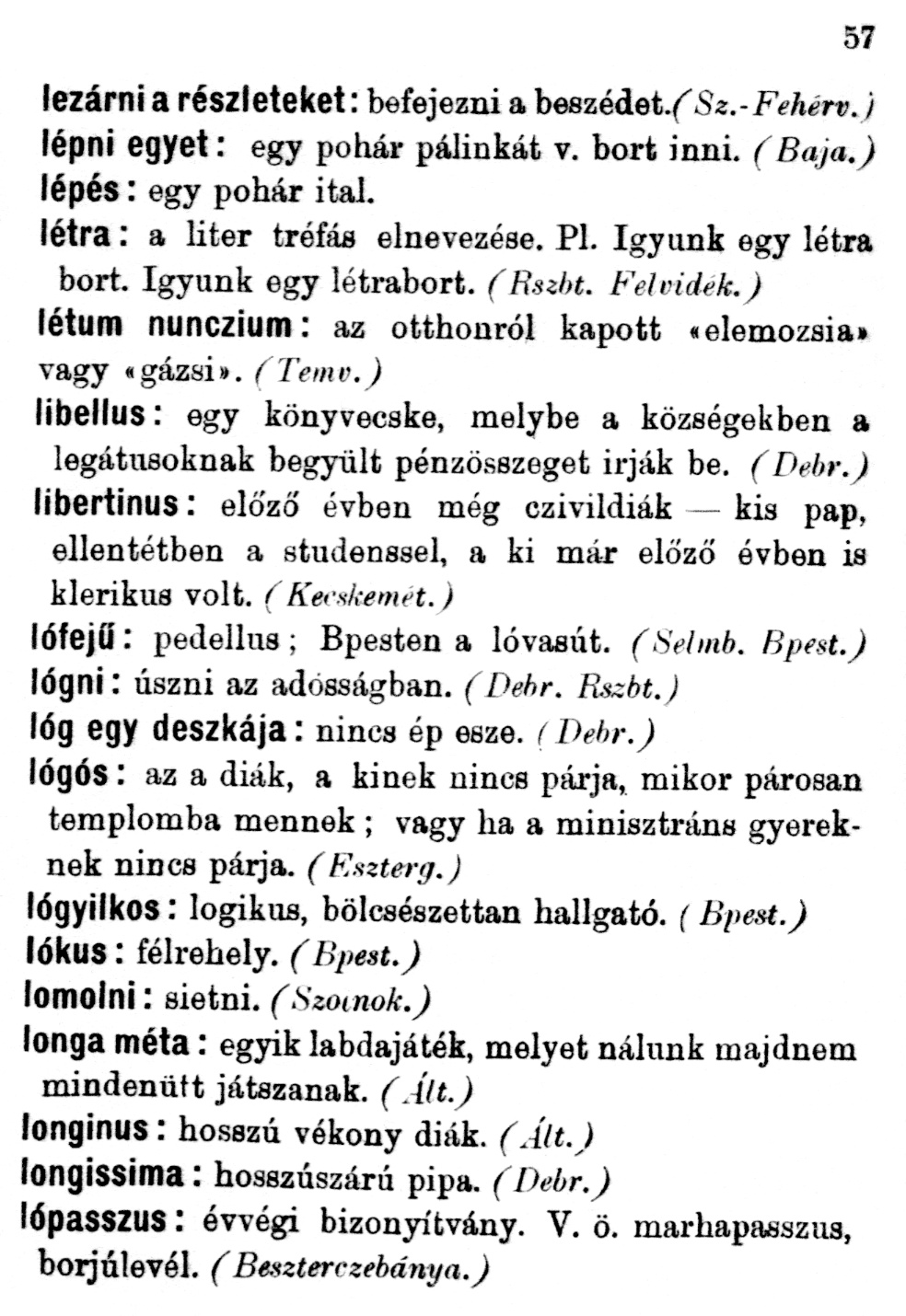 Egy lap Dobos Károly: A magyar diáknyelv és szótára c. munkájából (Bp., 1898)